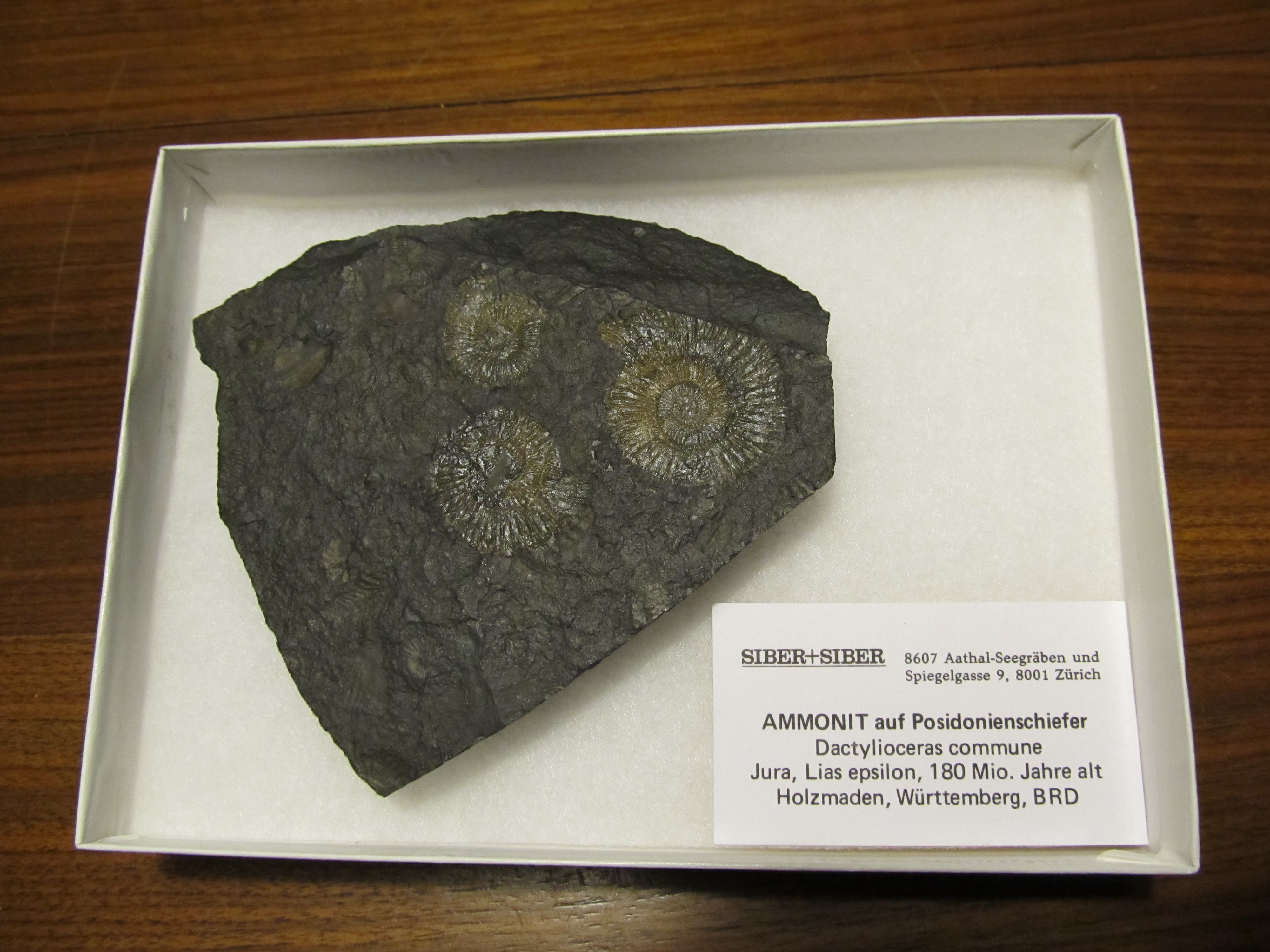 Dactylioceras commune auf Posidonienschiefer / Jura, Lias epsilon, 180 Mio. Jahre / aus Holzmaden, Württemberg, Deutschland